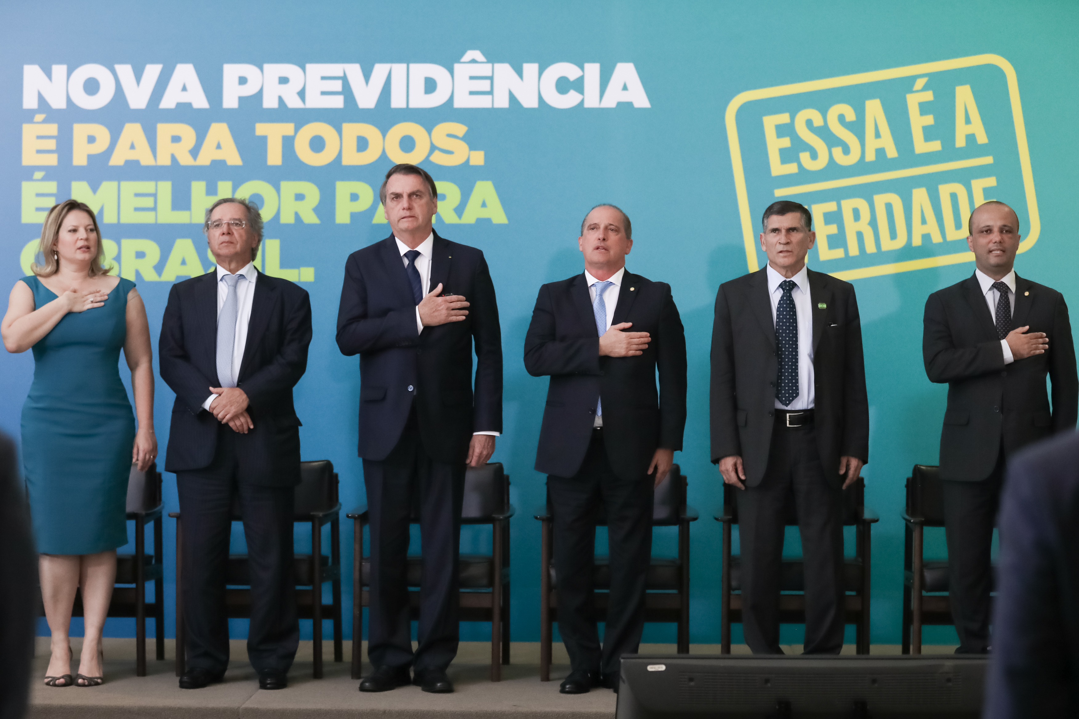 (Brasília - DF, 20/05/2019) Execução do Hino Nacional Brasileiro. Foto: Marcos Corrêa/PR